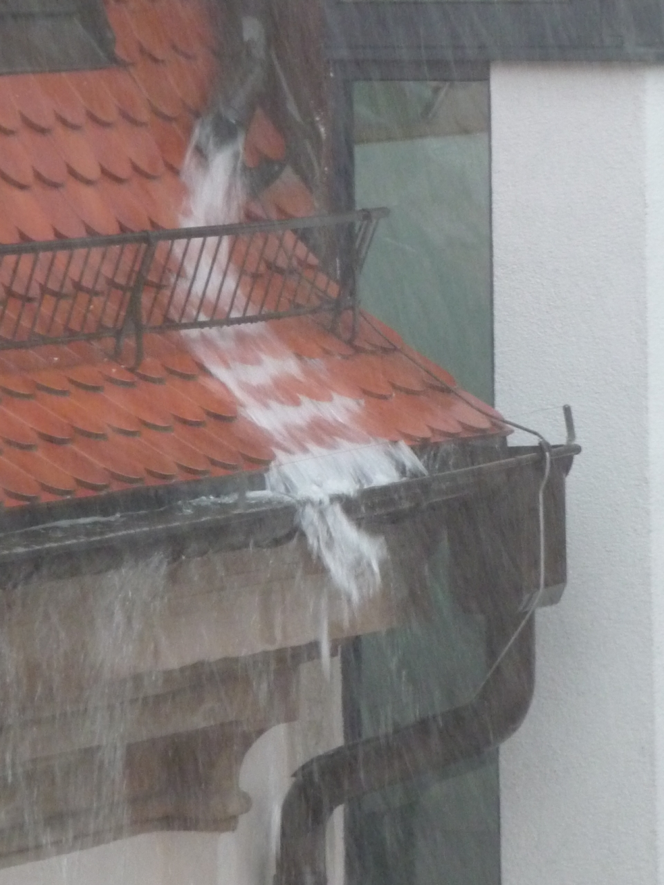 Regen im Bildungszentrum Nürnberg